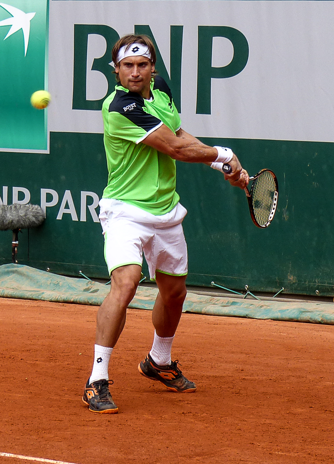 2ème tour Roland Garros 2013 : David Ferrer (ESP) def. Albert Montanes (ESP)